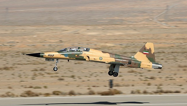 HESA Kowsar